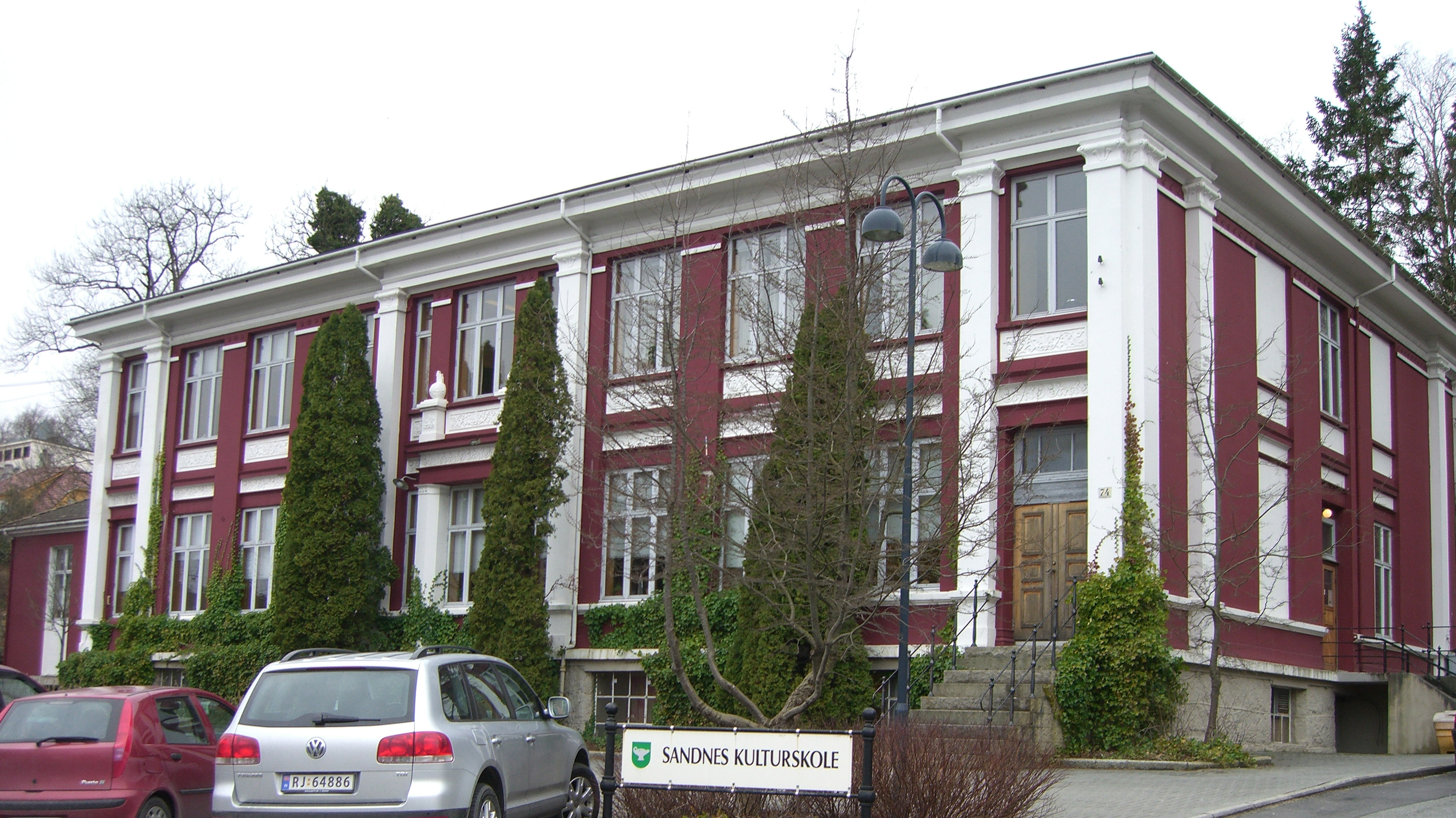 Langgata 74 in Sandnes, Norway